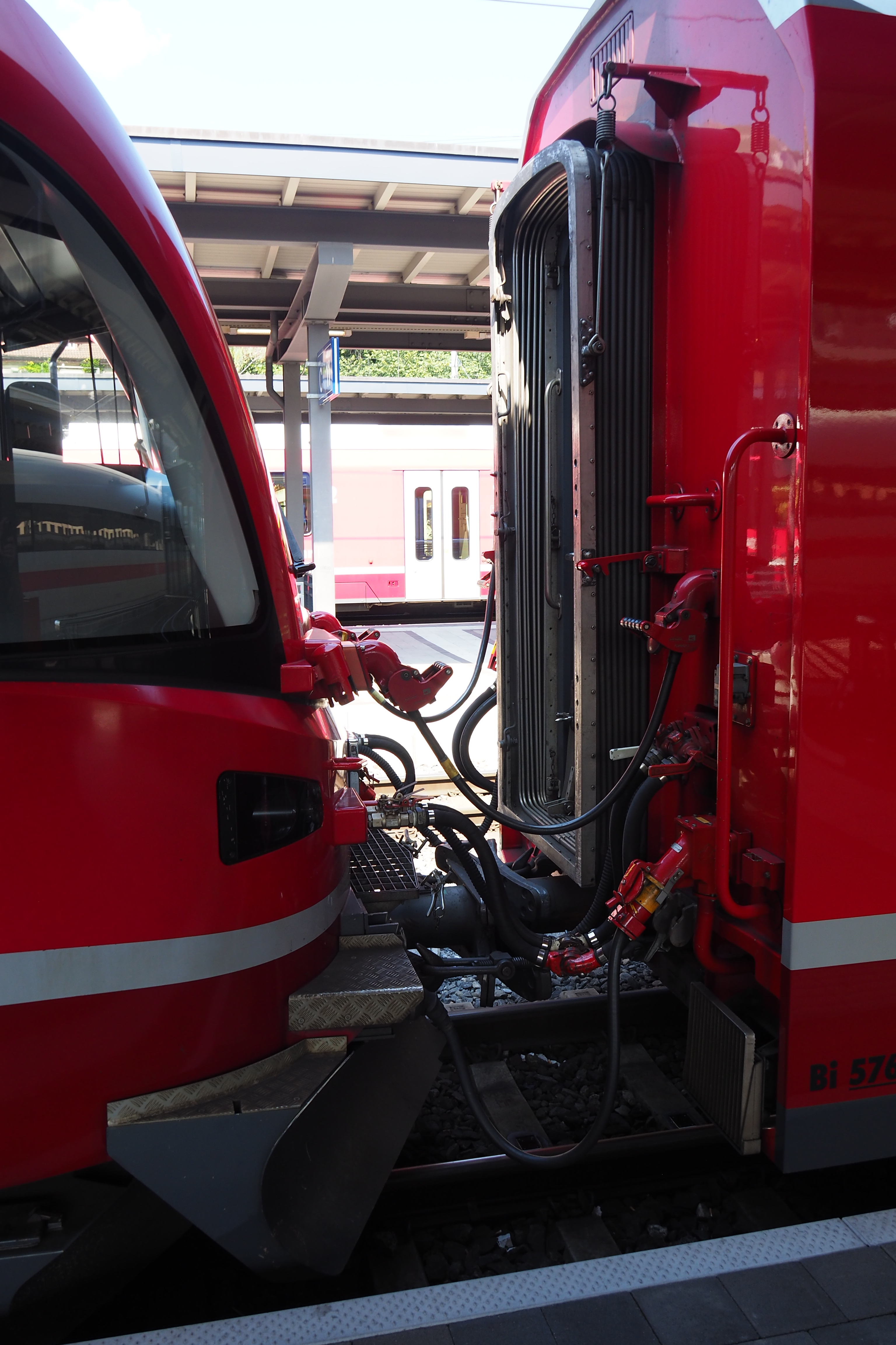 A detailed view of connectings of Stadler Allegra EMU.